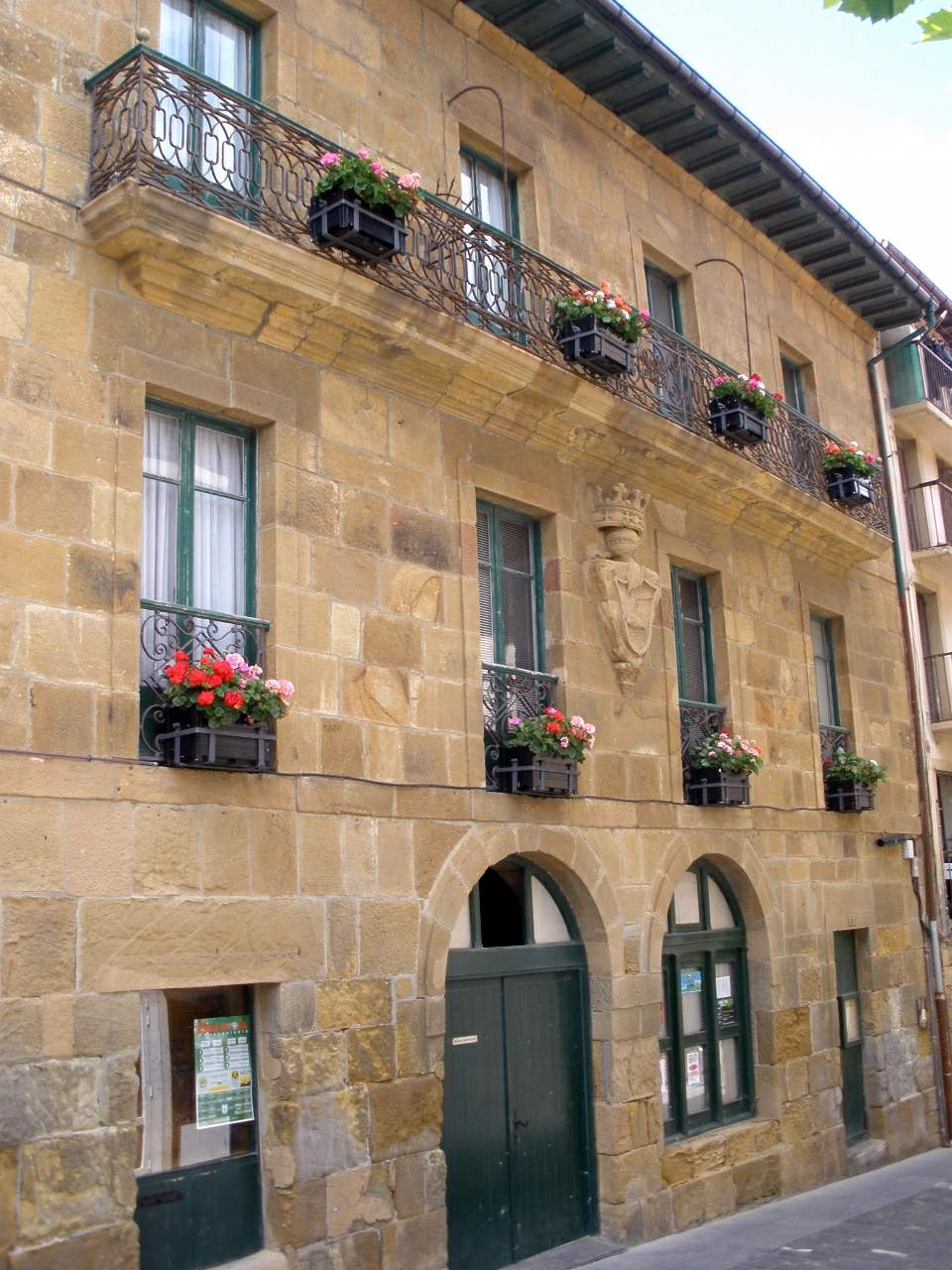 Antiguo Ayuntamiento de Getaria